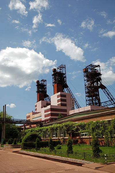 Копры ЗЖРК